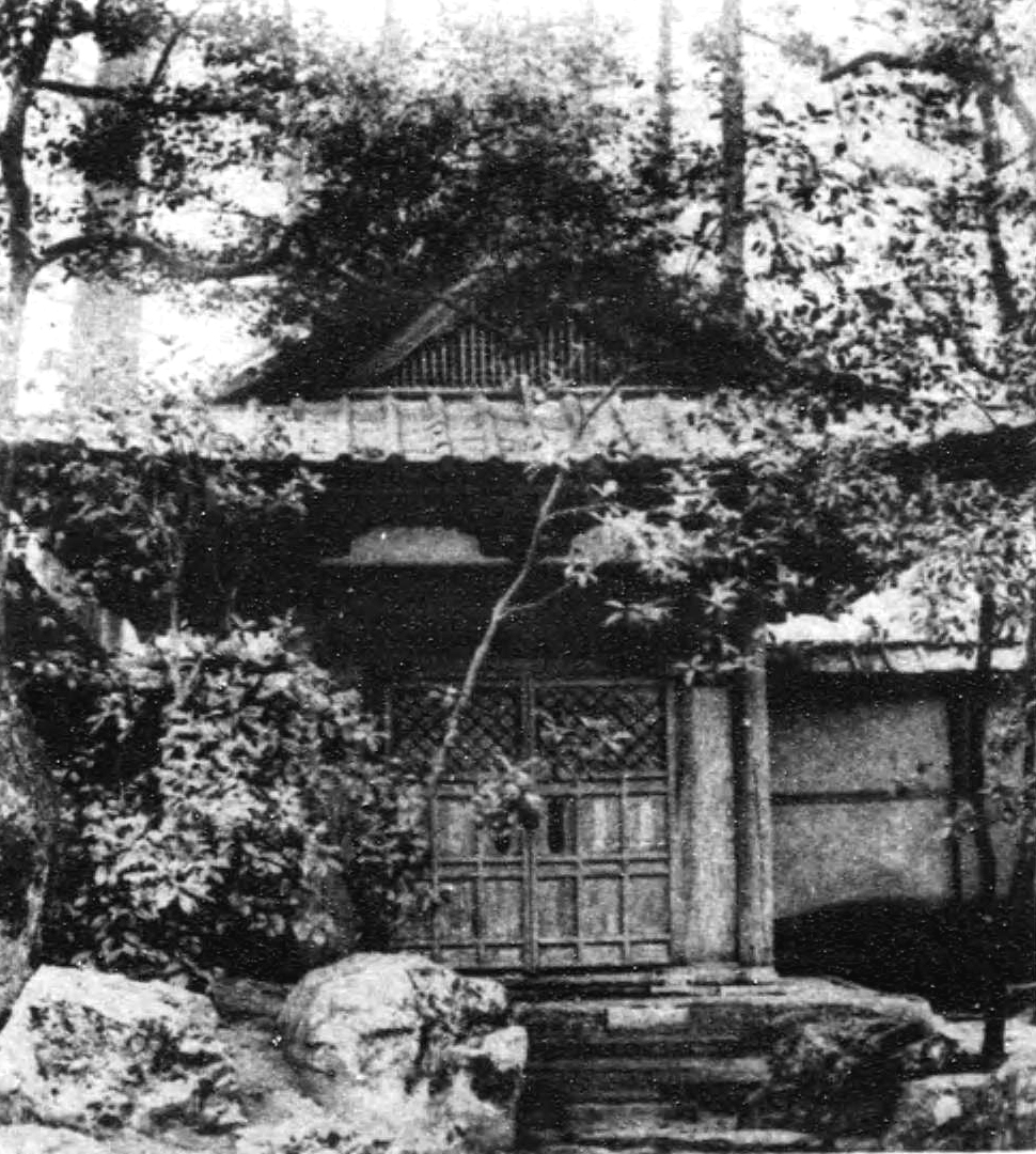 祥雲院霊廟（山城妙心寺在）。豊臣鶴松の霊廟。